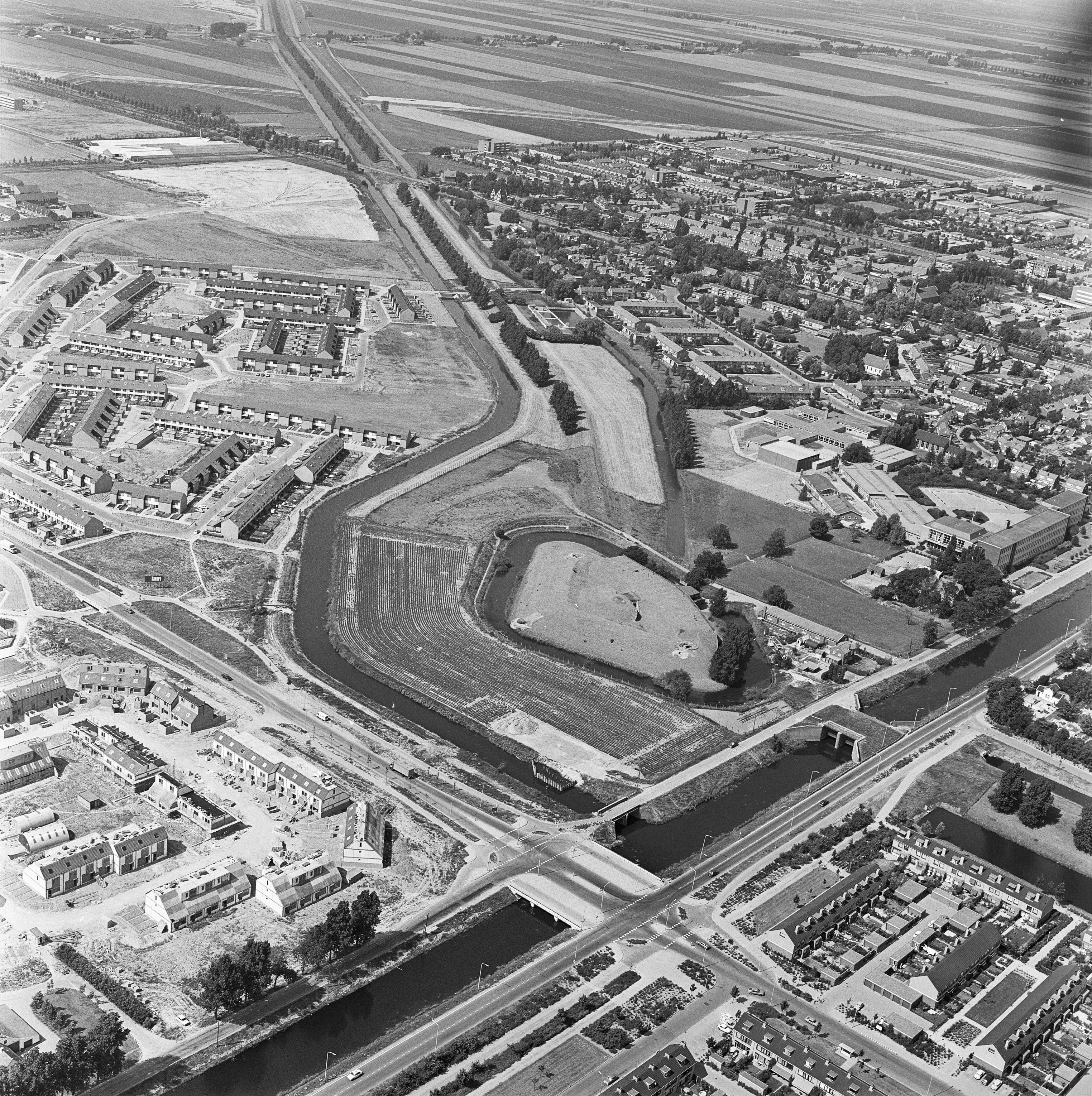 Overzichten: Luchtfoto's